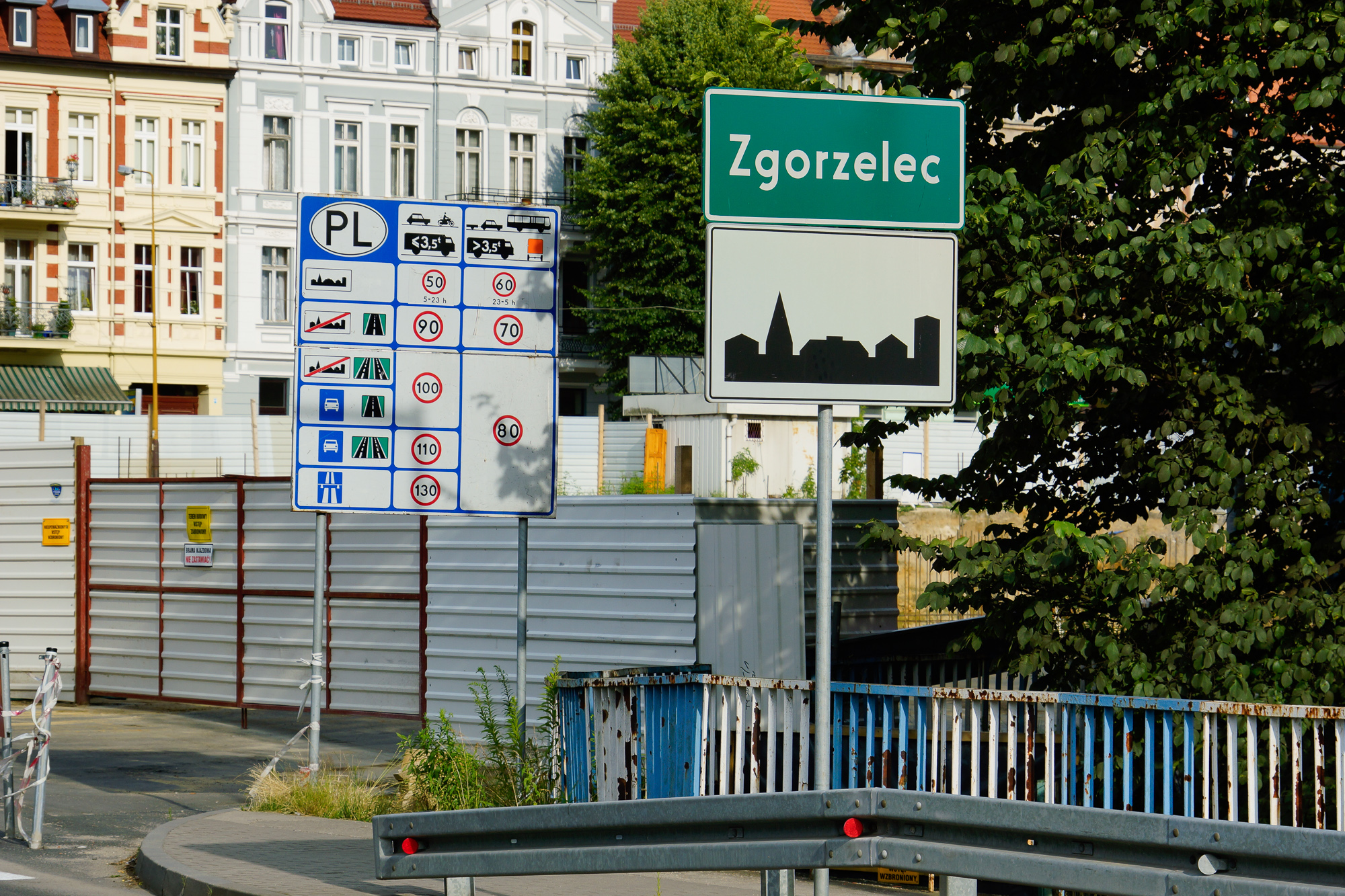 Zgorzelec, granica widziana z mostu Jana Pawła II.